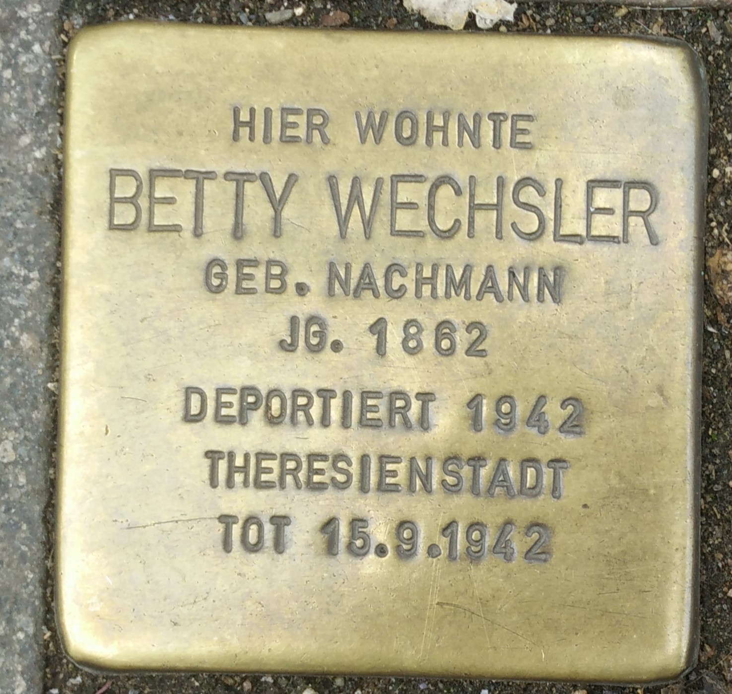 Bad Vilbel, Stolperstein Betty Wechsler